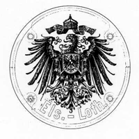 Lokschild der Reicheisenbahnen Elsass-Lothringen